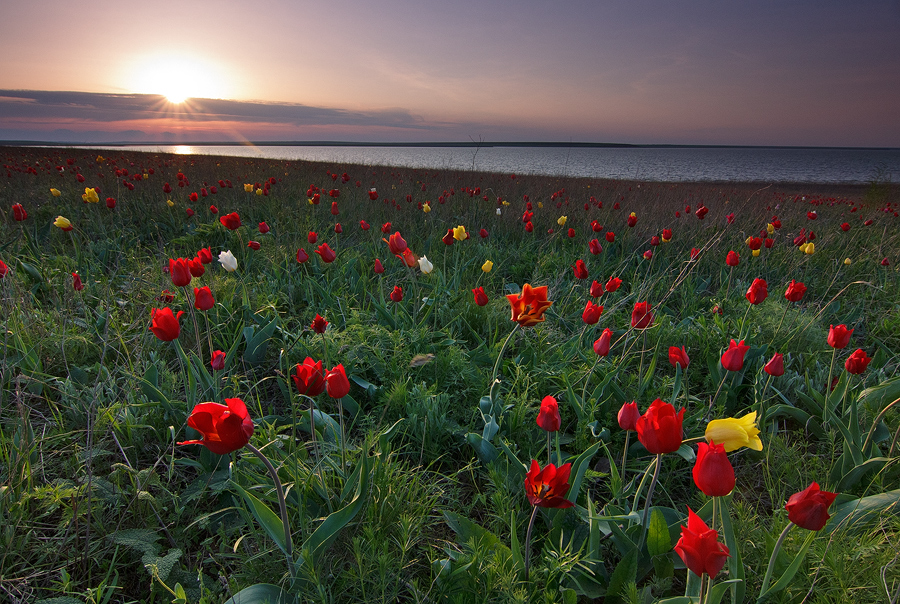 Остров тюльпанов, Ики-Бурульский район This image is related to the protected area of Russia number 0810006